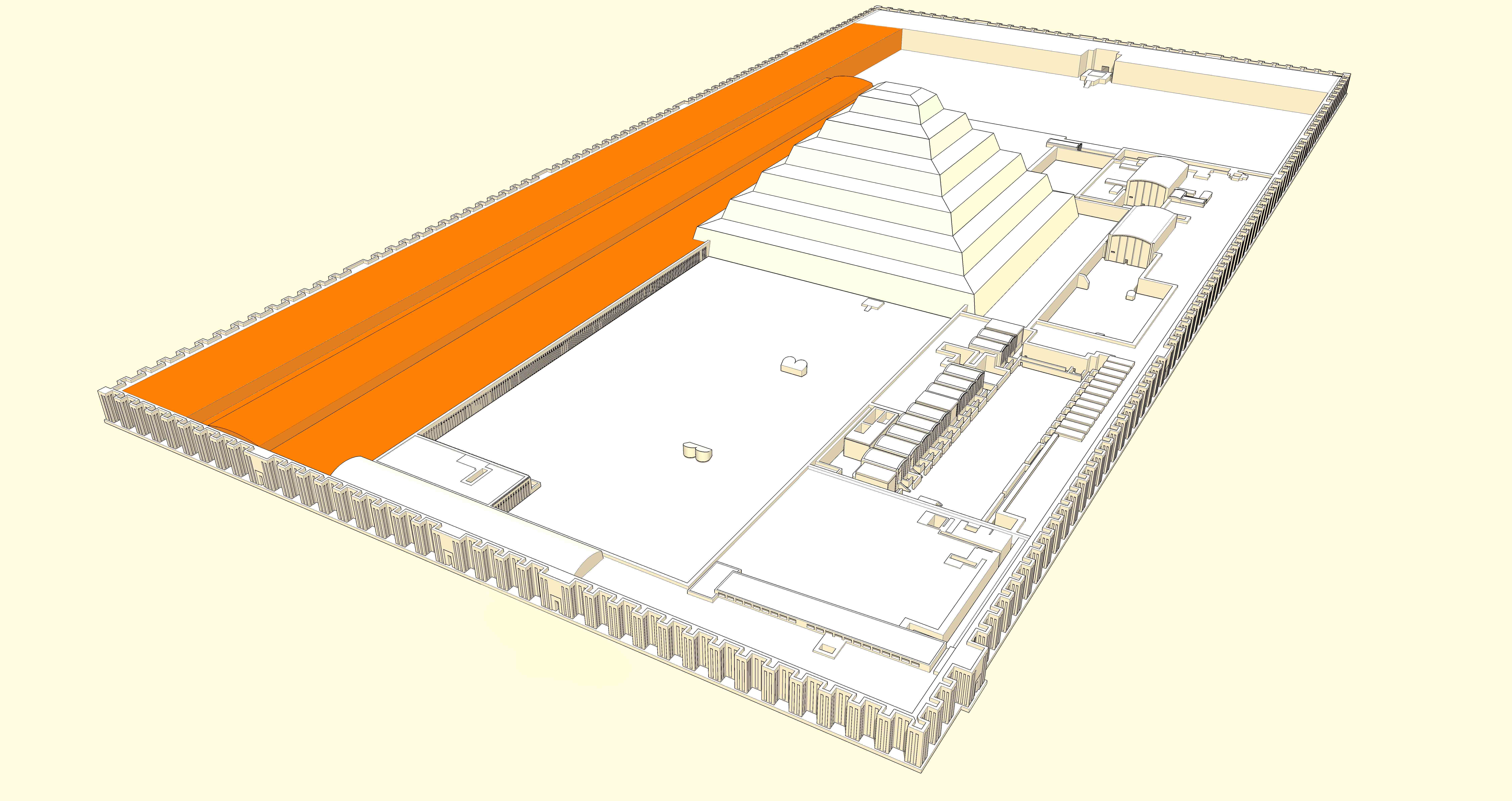 Position des magasins ouest dans le complexe funéraire de Djoser